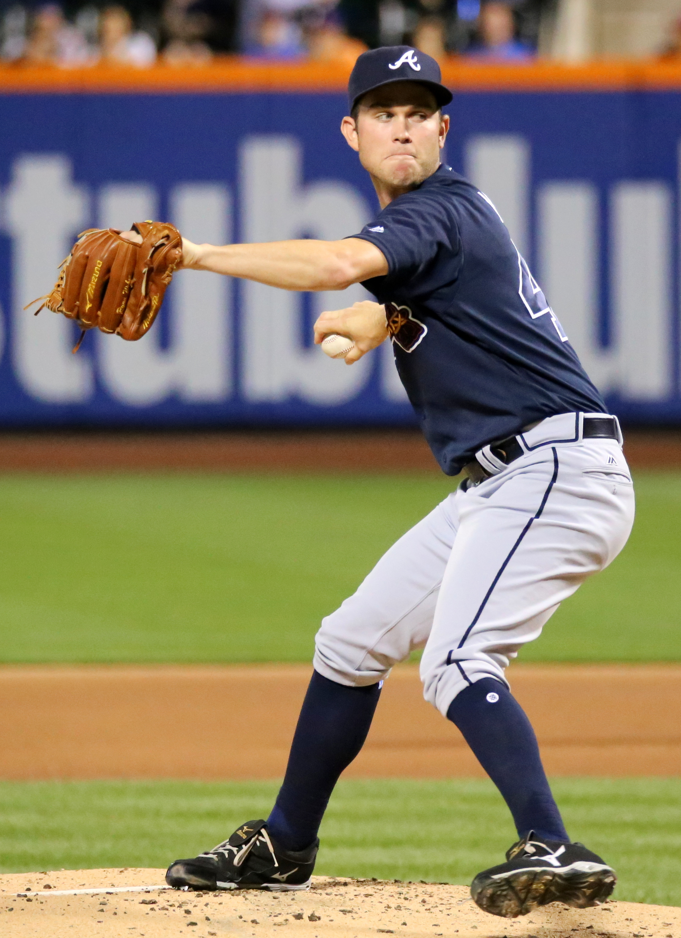 Ryan Weber